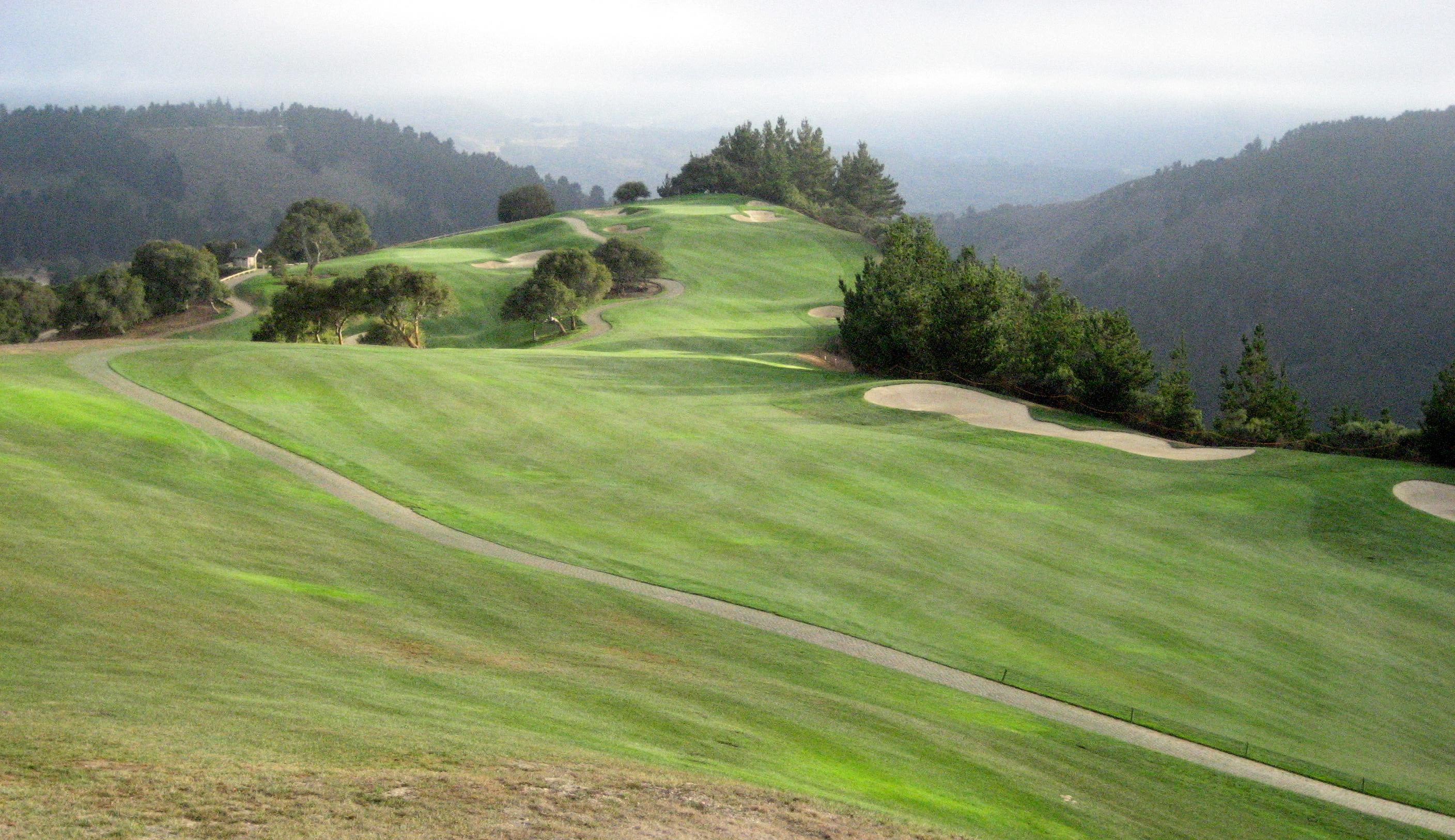 Tehama #4